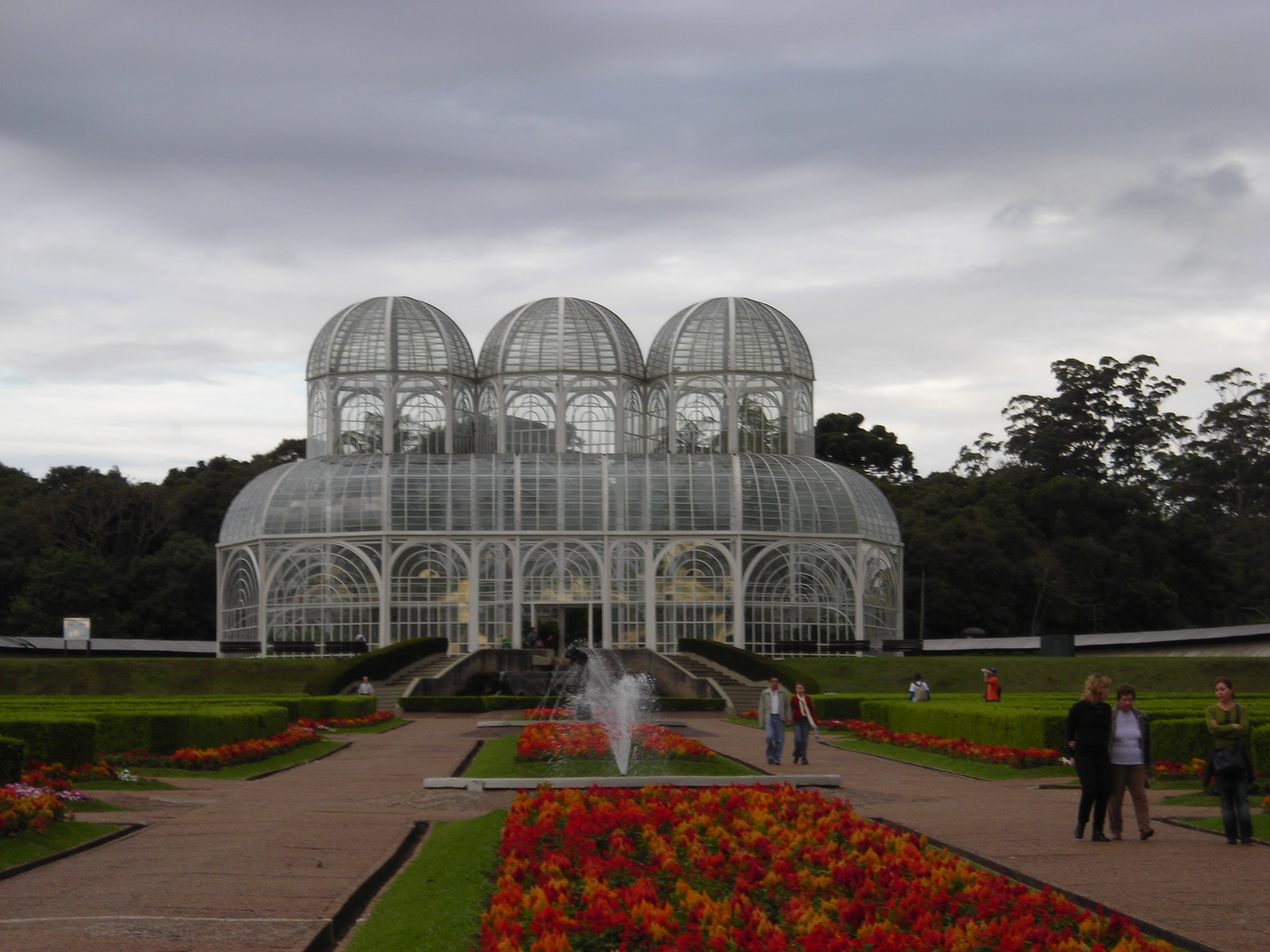 jardin botanique de Curitiba en automne